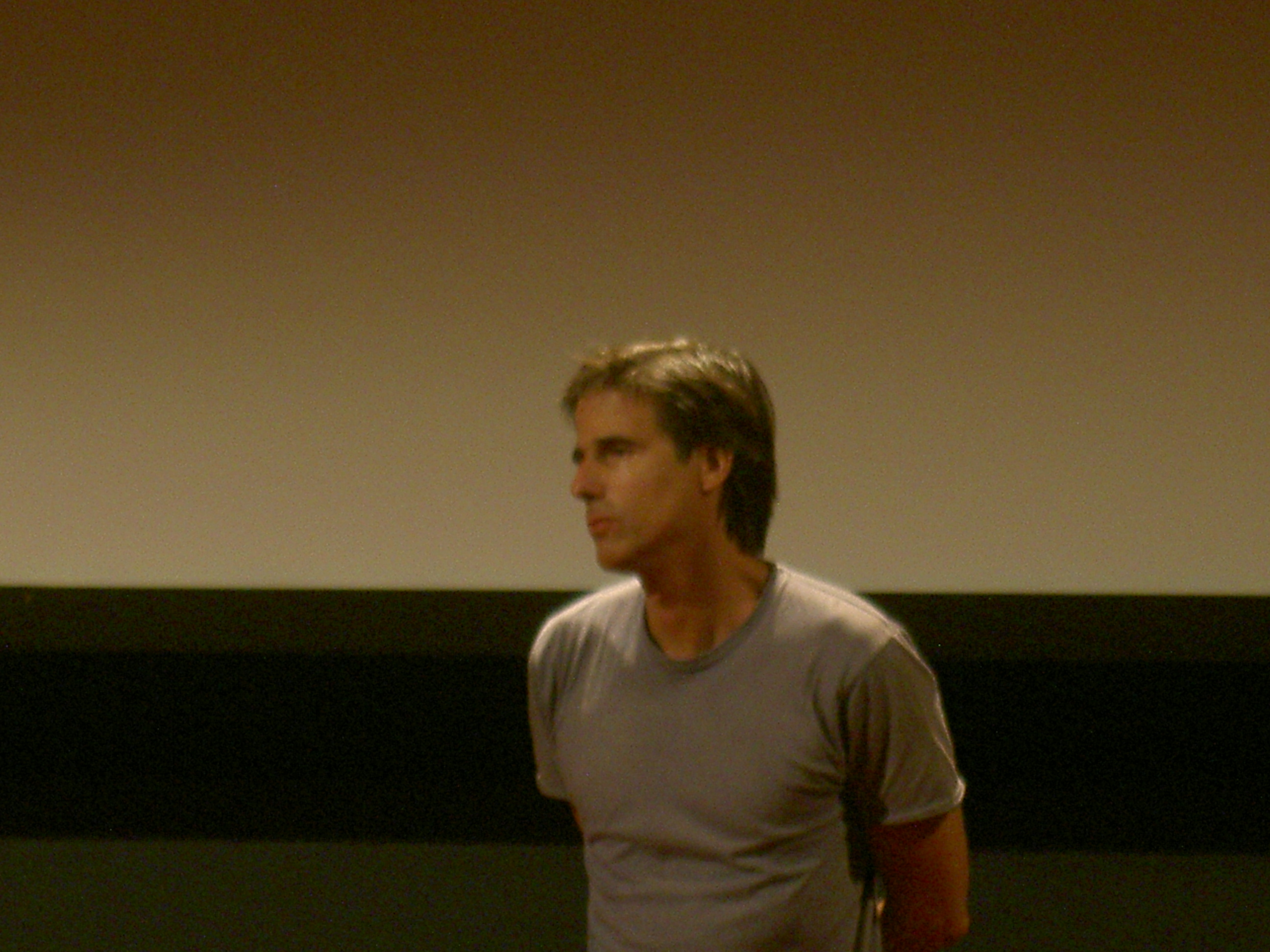 Walter Salles au forum des images à Paris